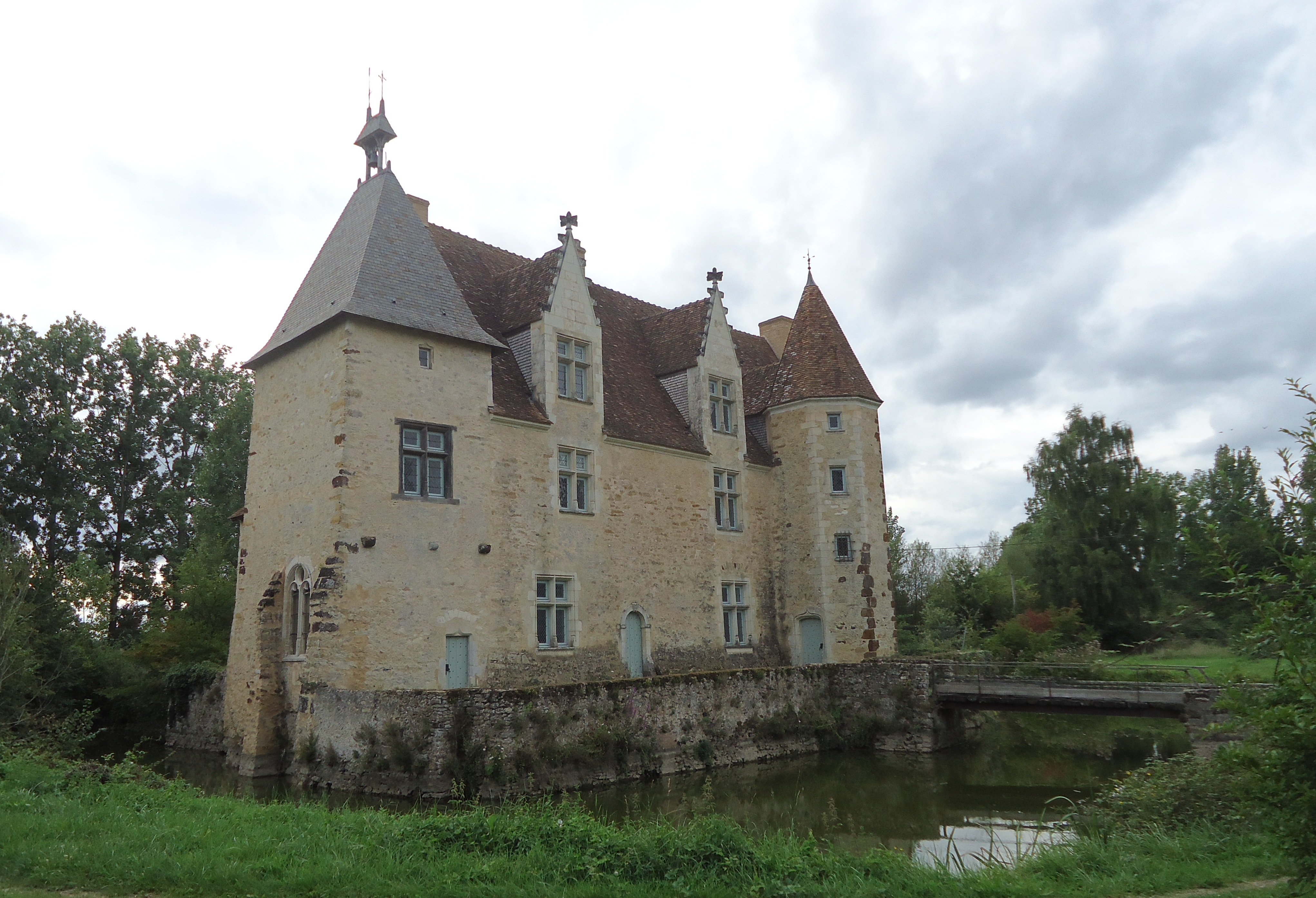 Manoir de la Poissonnière XVe - Saint-Ouen-en-Belin - Sarthe (72)